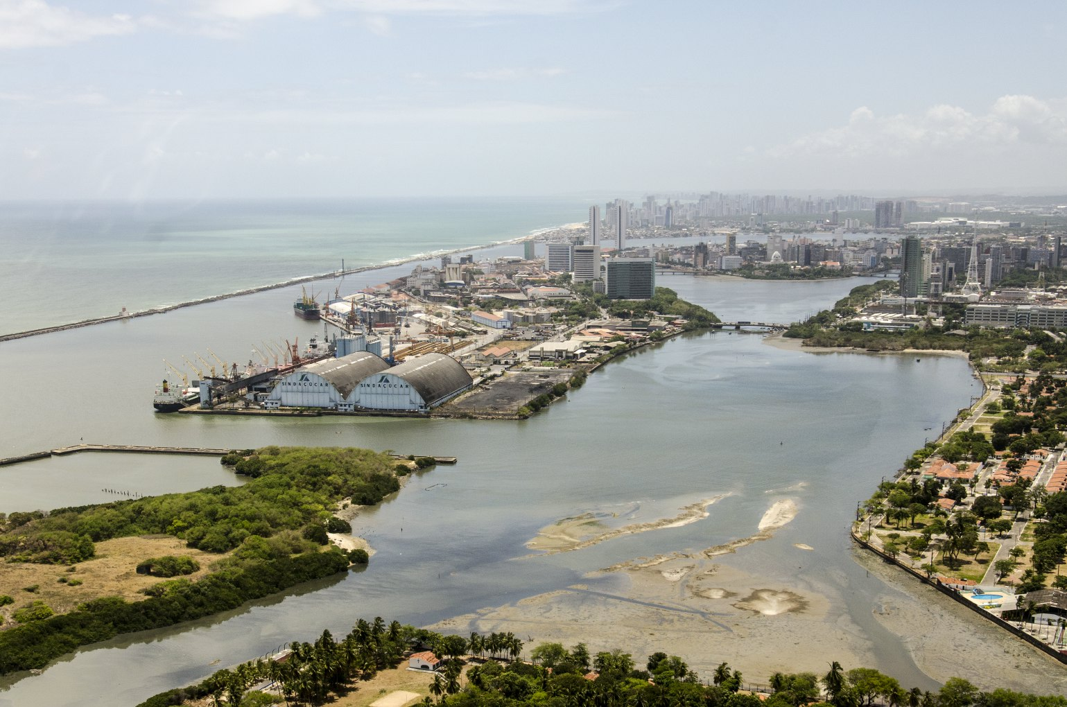 Foz dos rios Capibaribe, Beberibe, Jordão, Pina e Tejipió - Recife, Pernambuco, Brasil